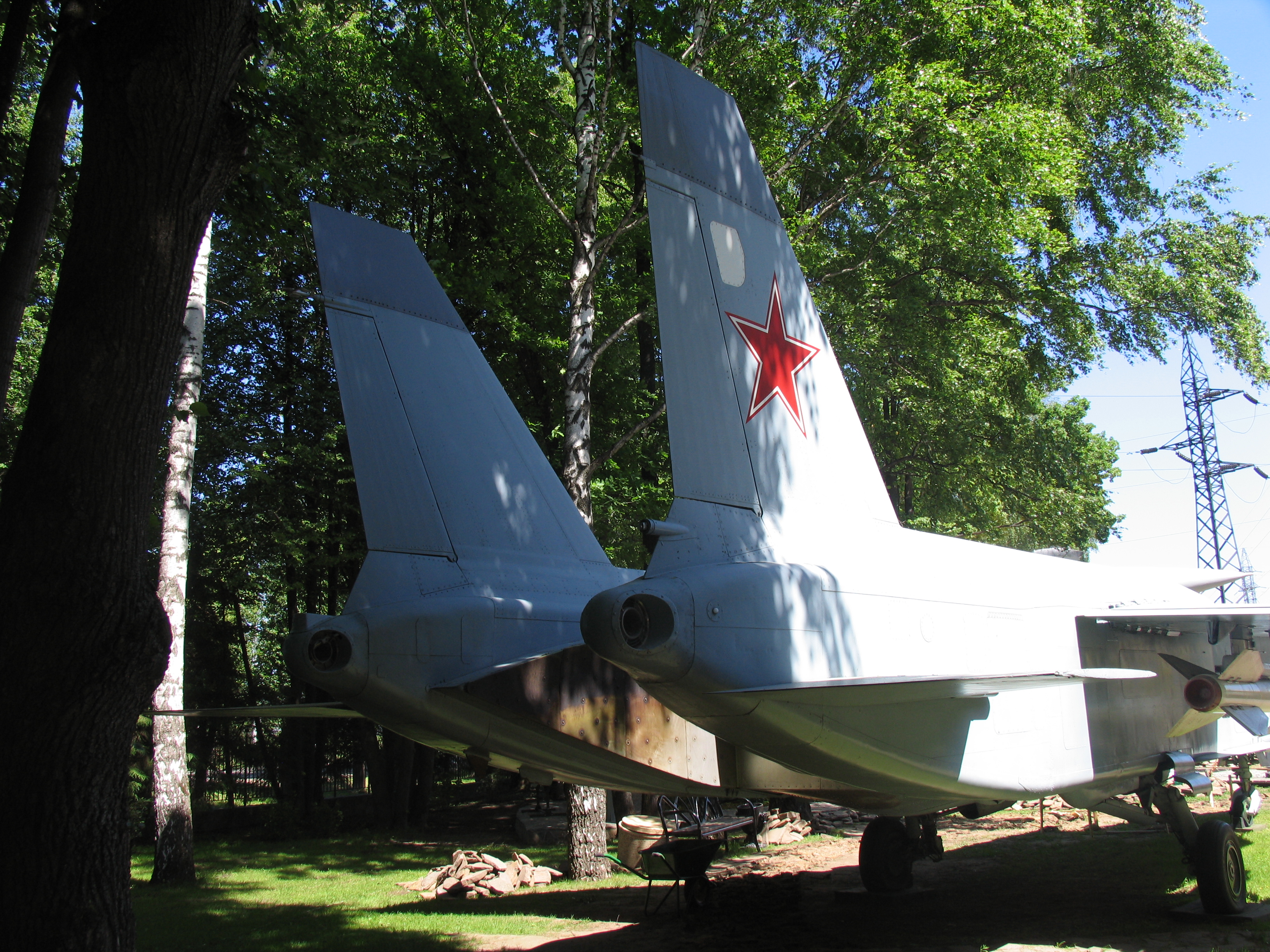 Як-141 в Музее техники Задорожного. Хвостовое оперение.